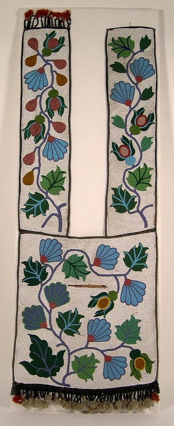 Ojibwe bandolier bag ca. 1930